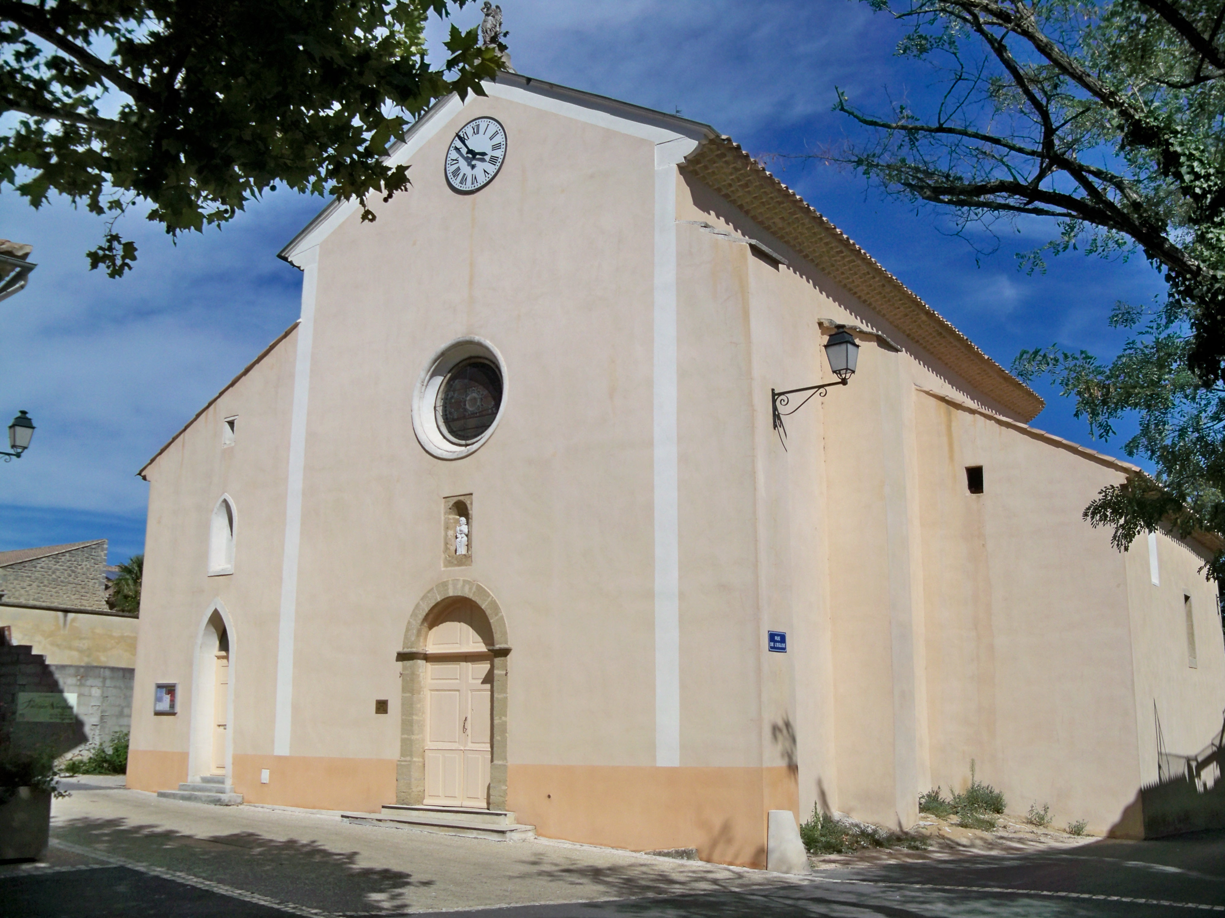 église Saint Michel, du hameau de la Galle, Uchaux, Vaucluse, France